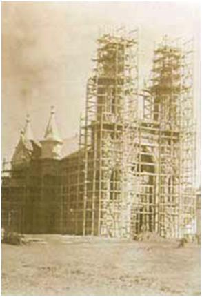 construção da matriz de xaxim